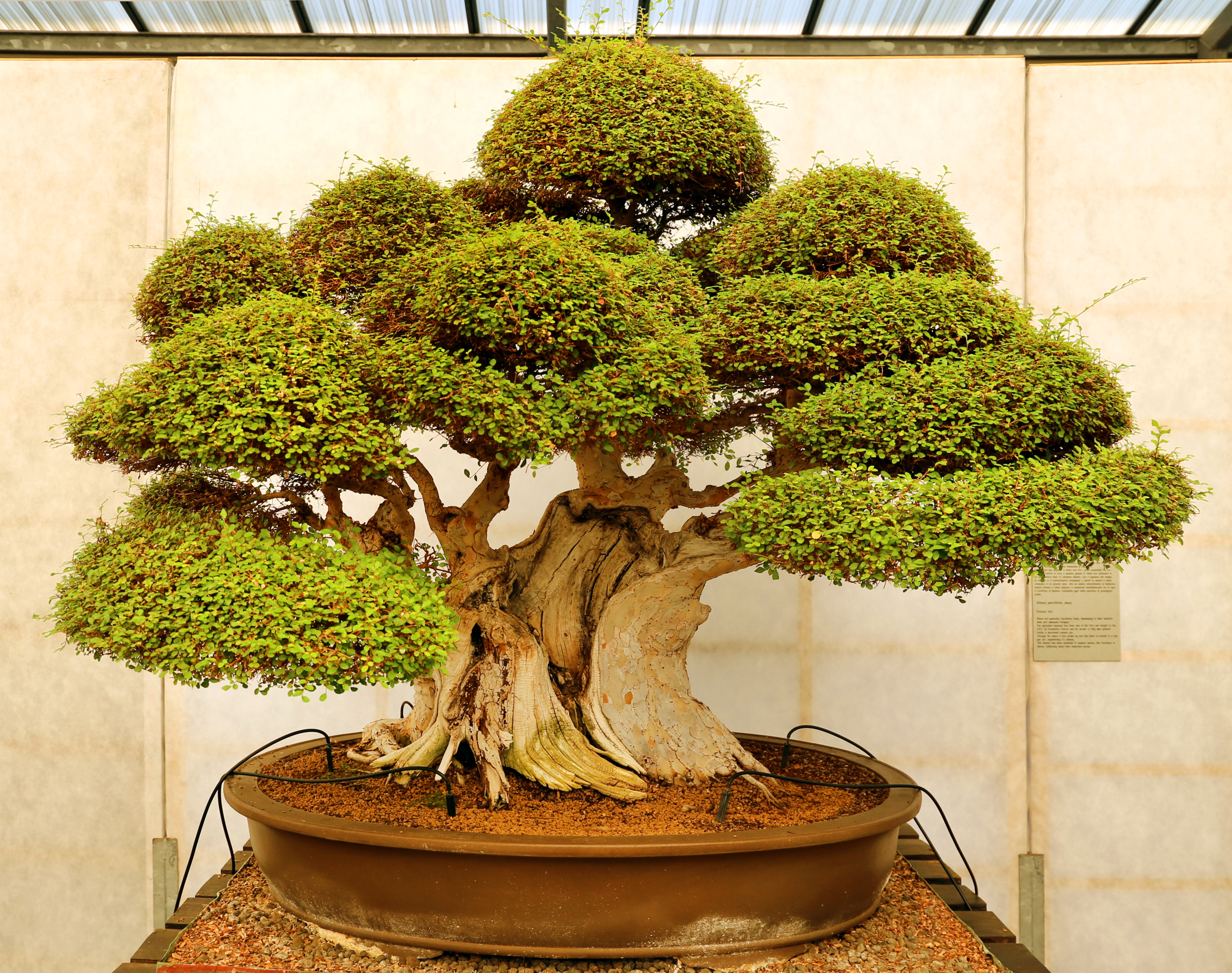 Museo del bonsai This is a photo of a monument which is part of cultural heritage of Italy.